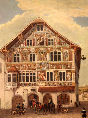 Fresken von Tobias Stimmer an der Fassade des Hauses zum Ritter. Zeichnung von J. J. Beck, ca. 1850.